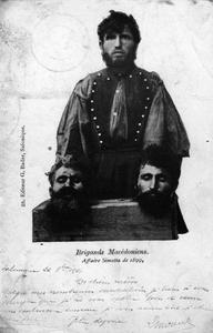 Главите на двама четници Караливанос